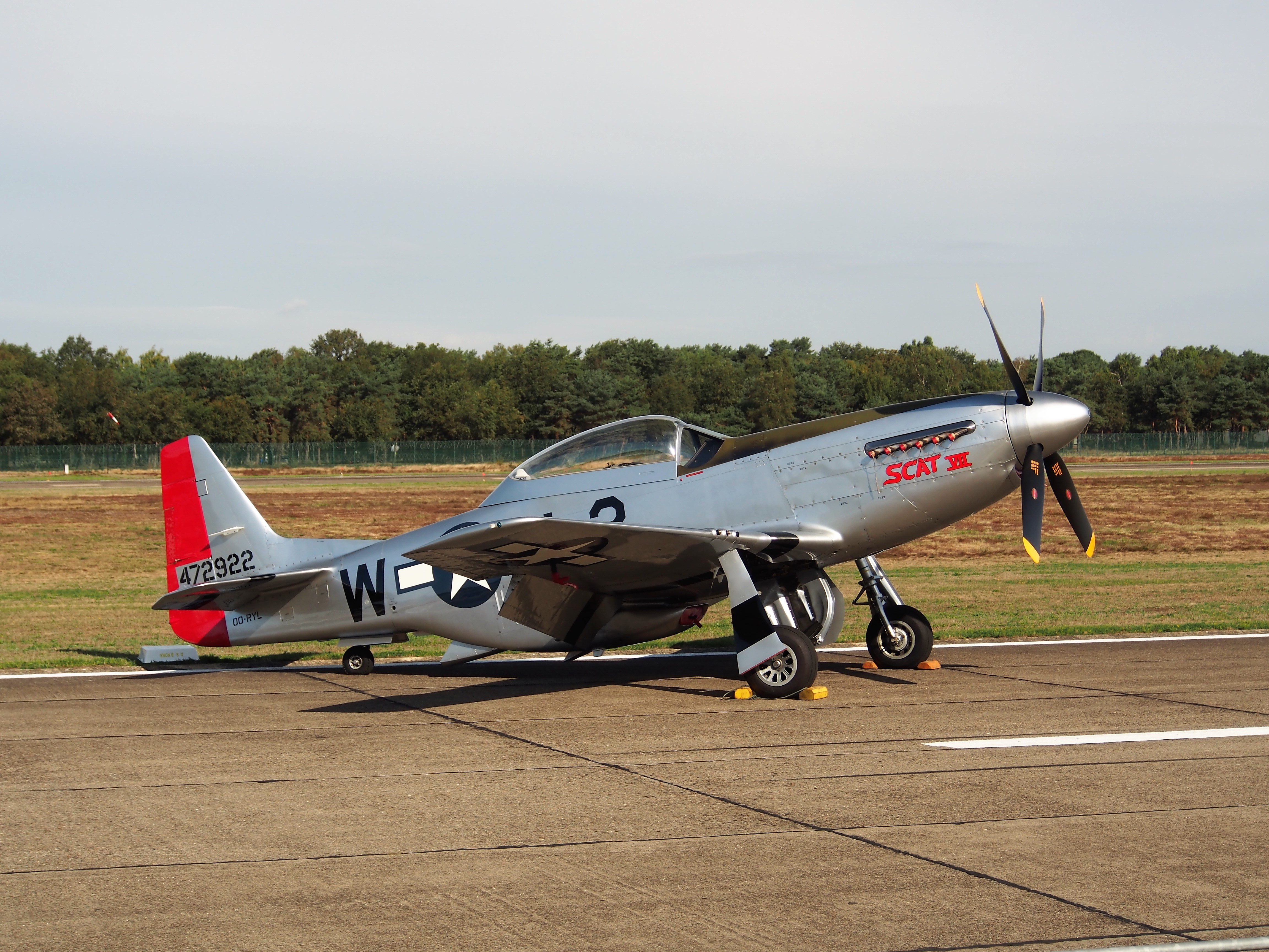 Photographed at Kleine Brogel Air Base, Belgium.